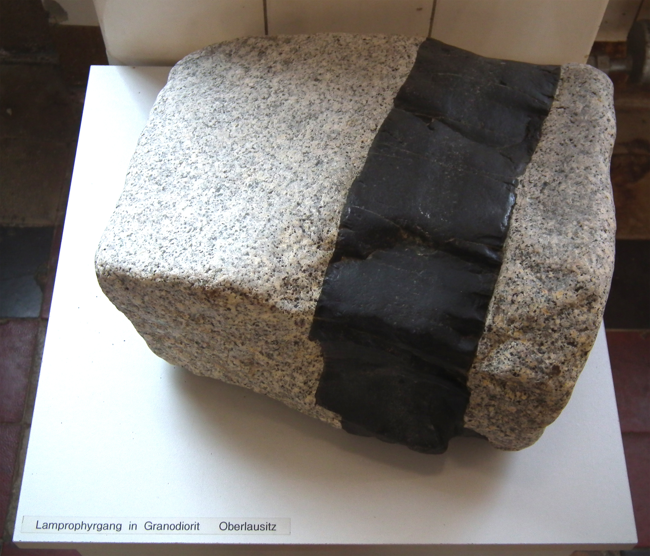 Energiefabrik Knappenrode 2016-05-05; Lamprophyrgang in Granodiorit, Oberlausitz